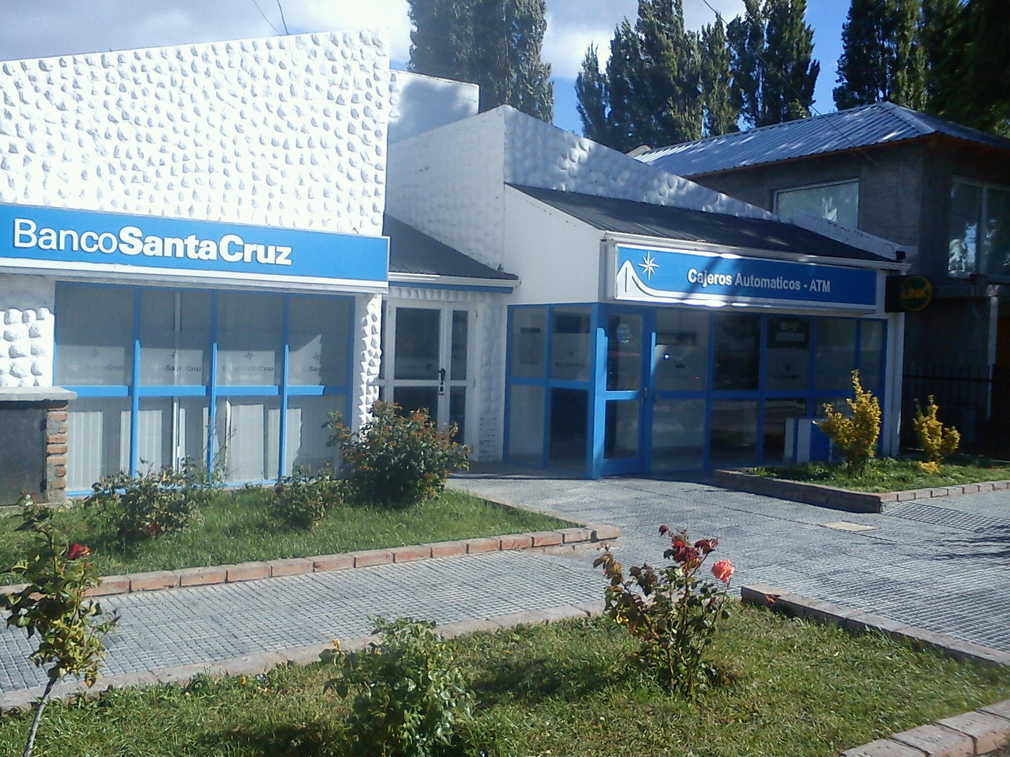 Los Antiguos, Santa Cruz